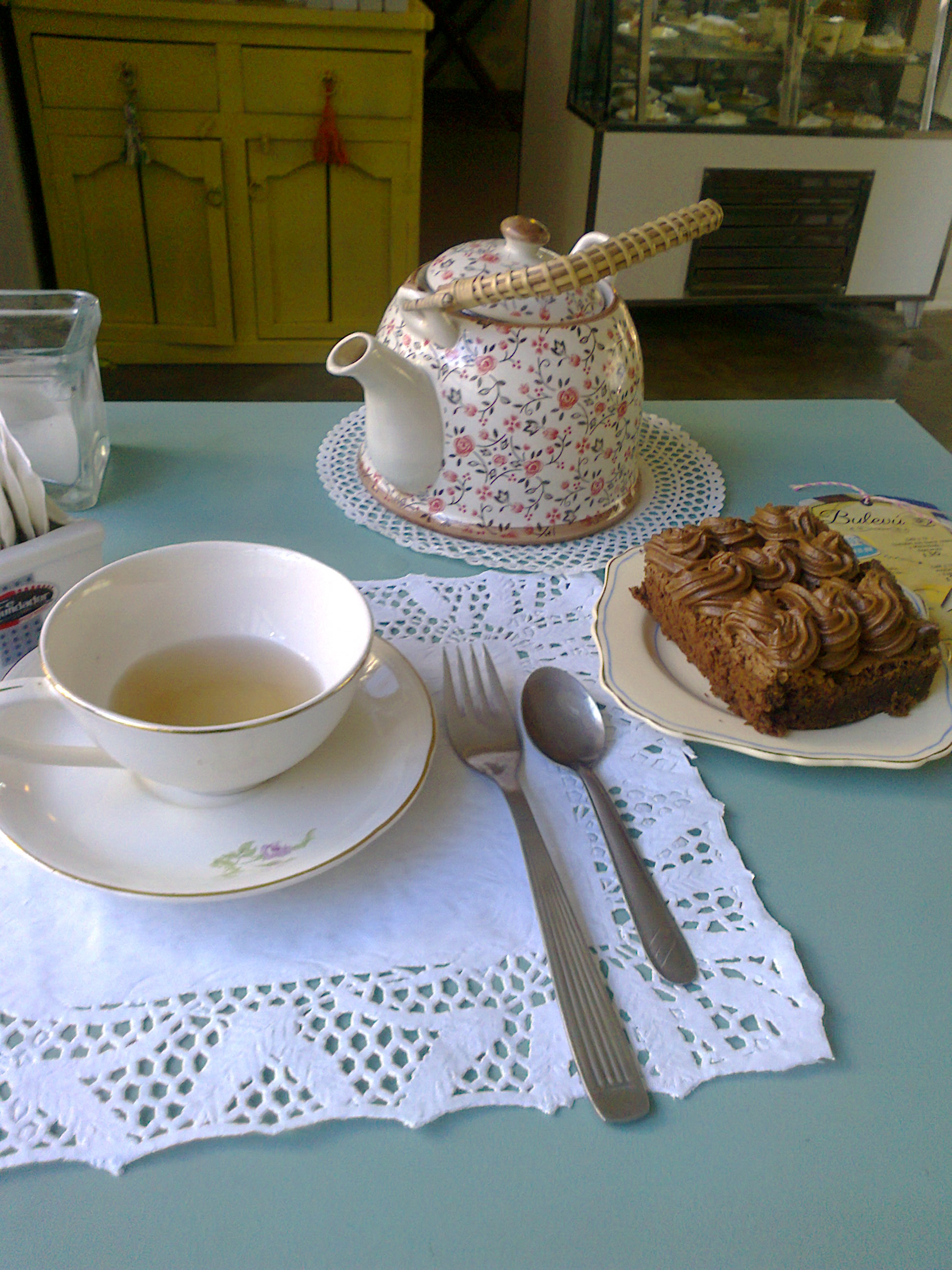 El Té Galés es una costumbre familiar galesa. Forma parte de la cultura del VIRCH y los turistas lo encuentran para agasajarse en distintas "Casas de Té": el Té con su típica torta negra galesa, tarta de crema, torta de nuez, tarta de manzana, torta de chocolate con crema, y tartas con frutas, dulces y manteca regional, scons y pan casero.